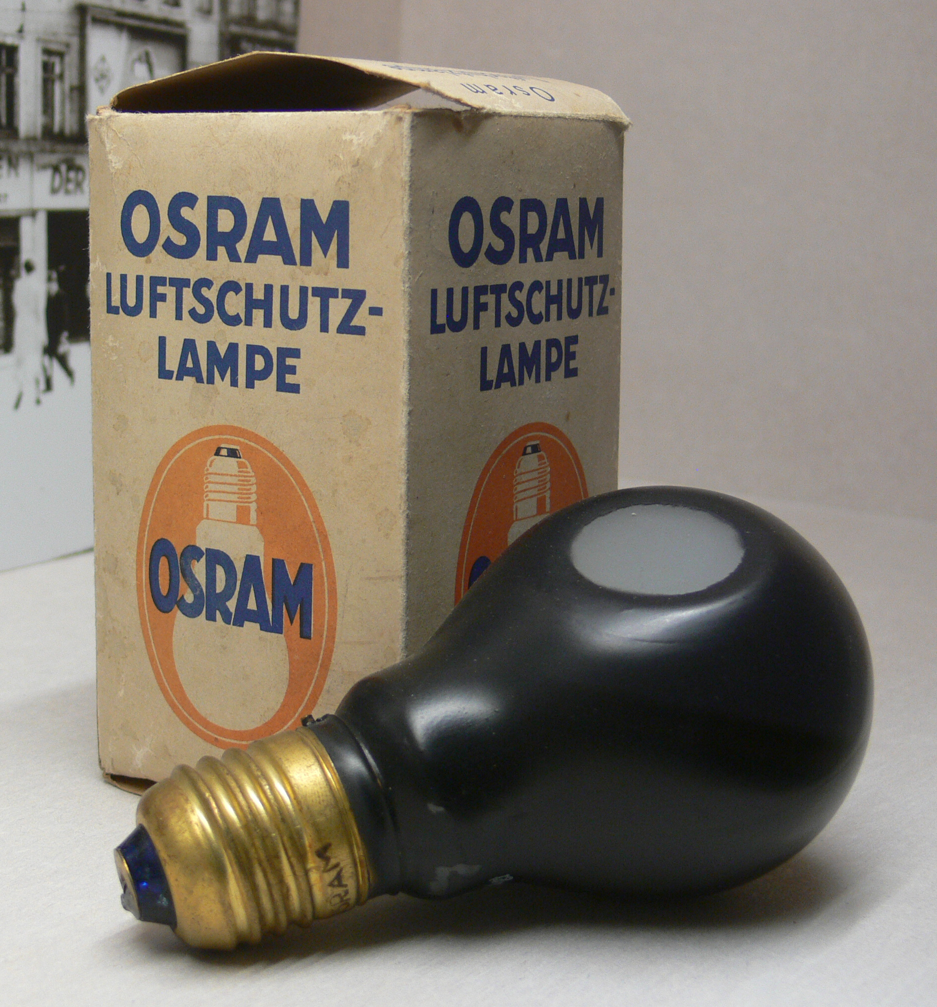 Osram Luftschutzlampe, 1940er Jahre (Verdunklungslampe) Schloßbergmuseum Chemnitz, Bildersaal Chemnitzer Geschichte